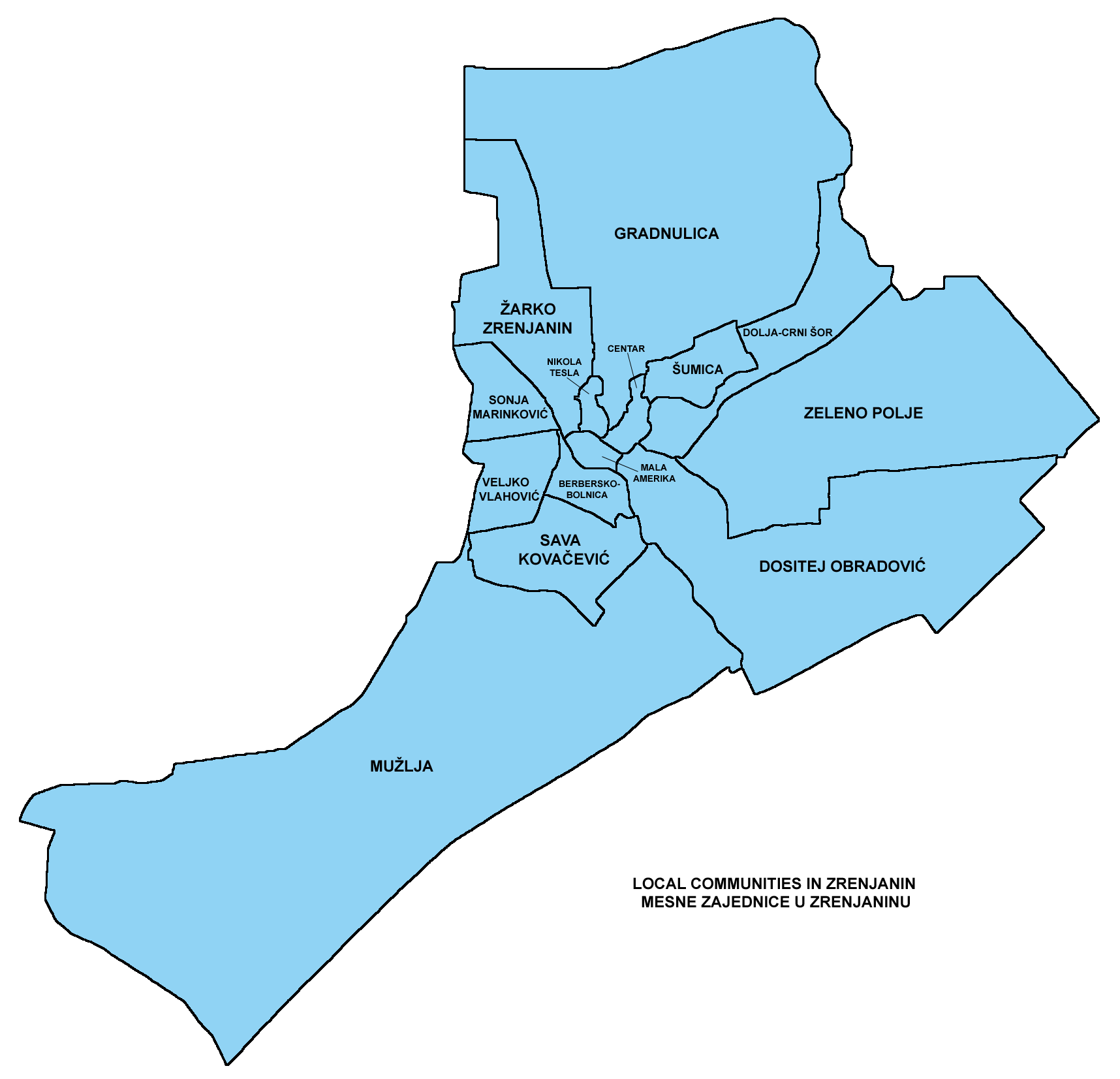 Local communities in Zrenjanin. Mesne zajednice u Zrenjaninu.